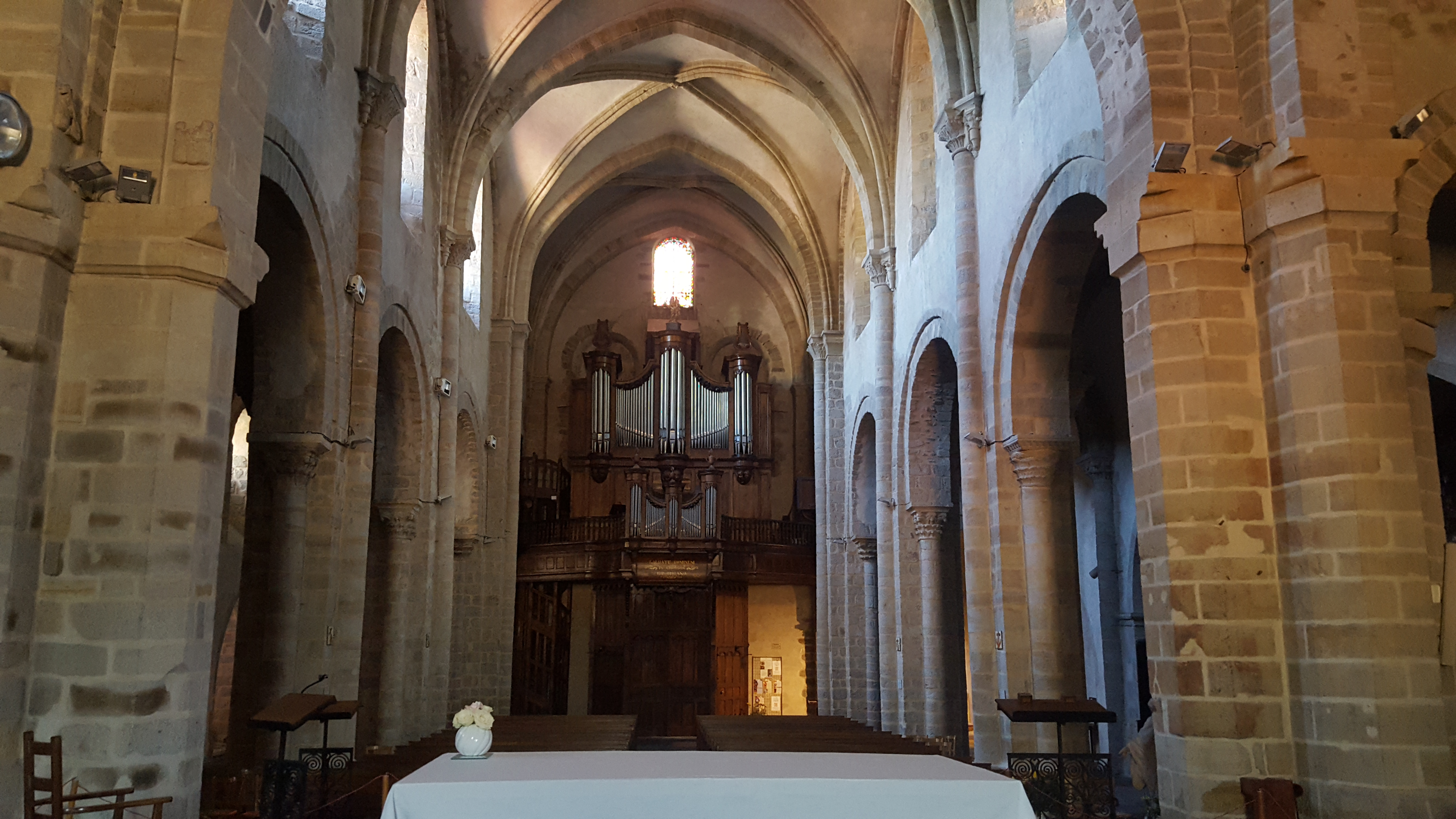 Intérieur de église Saint-Genès de Thiers en Auvergne.